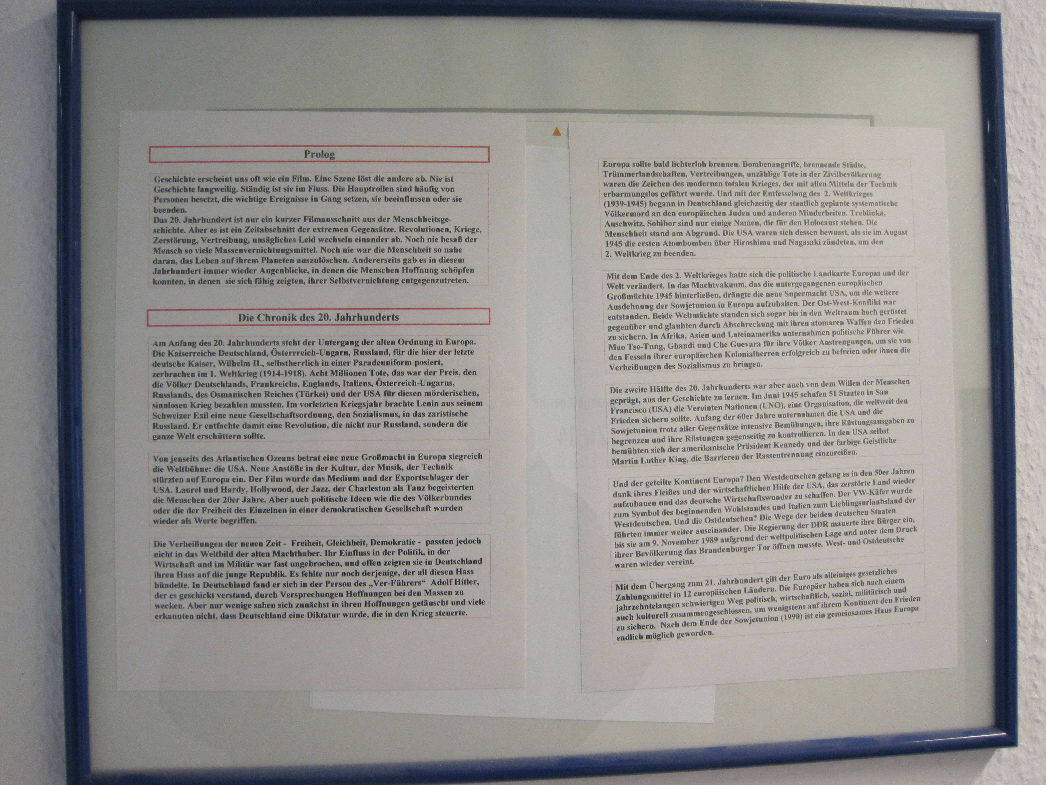 Das Foto zeigt eine Schatafel im Rathaus Bockum-Hövel.